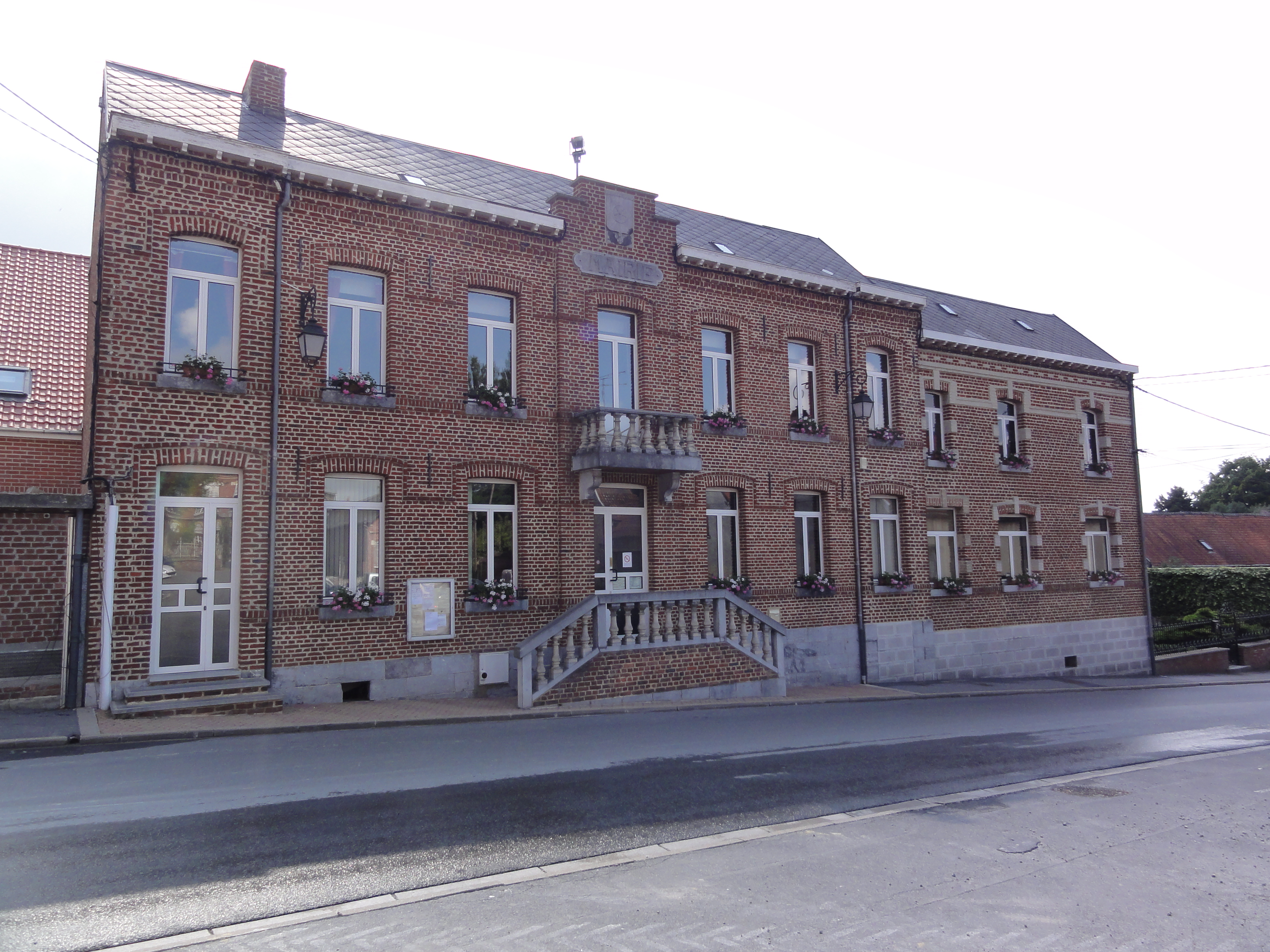 Poix-du-Nord (Nord, Fr) mairie